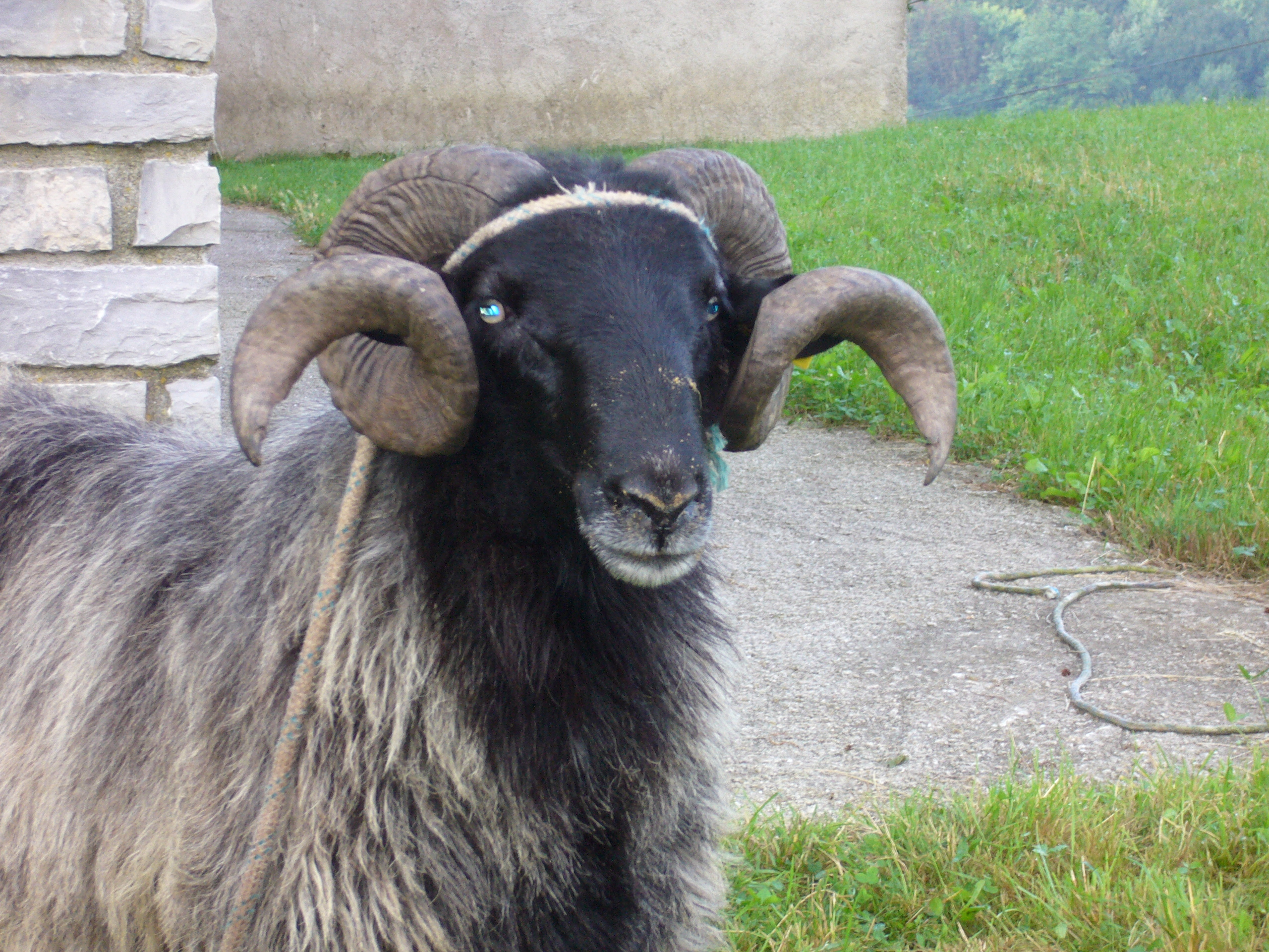 ahari talkarako ahari beltza